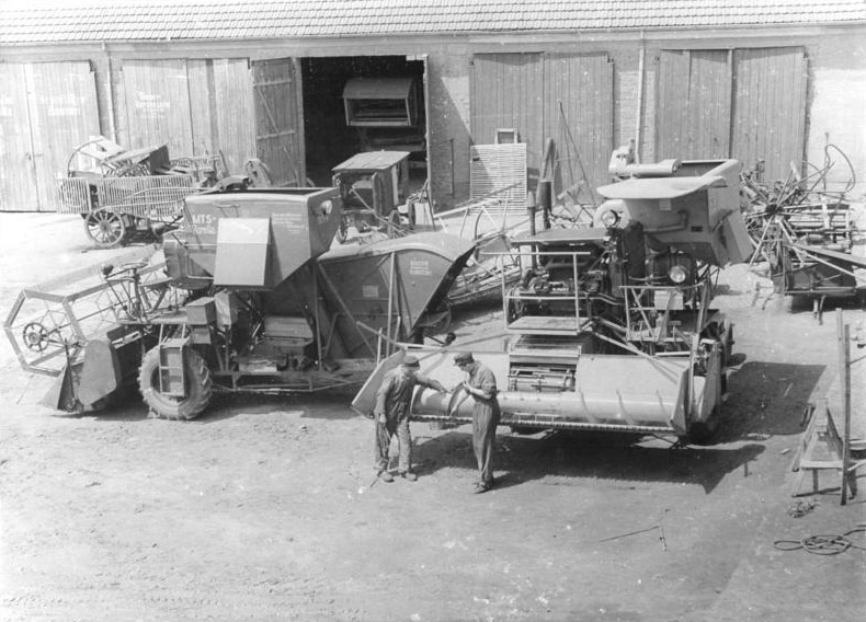 Barnitz, Blick auf den Hof der MTS Zentralbild Siegert 15.6.1955 Erntevorbereitungen auf der MTS Barnitz, Krs. Meißen Bis jetzt haben die Kollegen der MTS Barnitz ihr Erntereparaturprogramm mit 85 % erfüllt. Am "Tag der Erntebereitschaft", den 25. und 26.6.1955, werden auch die restlichen Maschinen und Geräte einsatzbereit sein. UBz: Die Erntemaschinen, die überholt werden, auf dem Hof der MTS.